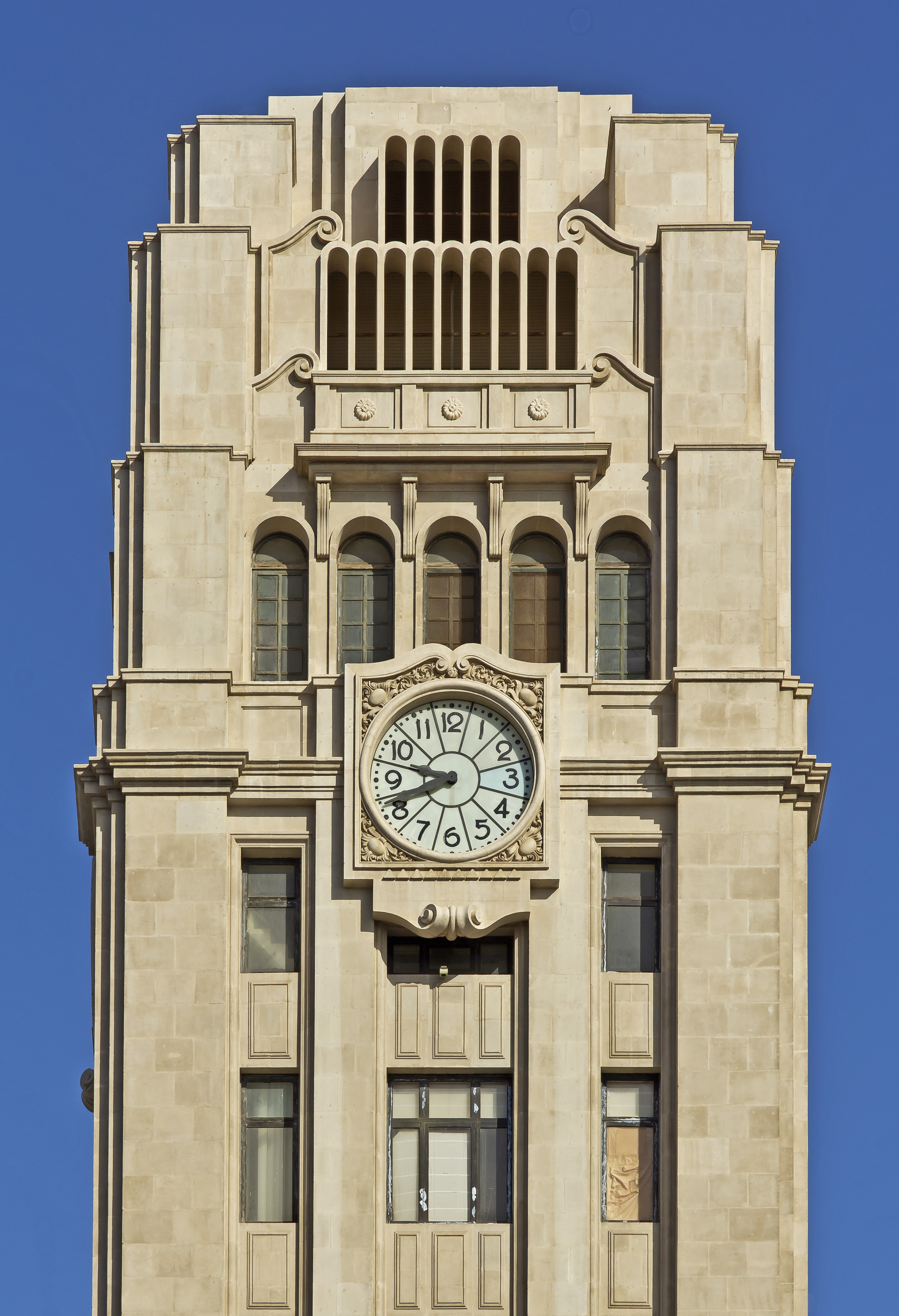 Turmspitze des Cabildo Insular de Tenerife in Santa Cruz de Tenerife, Blick von Osten